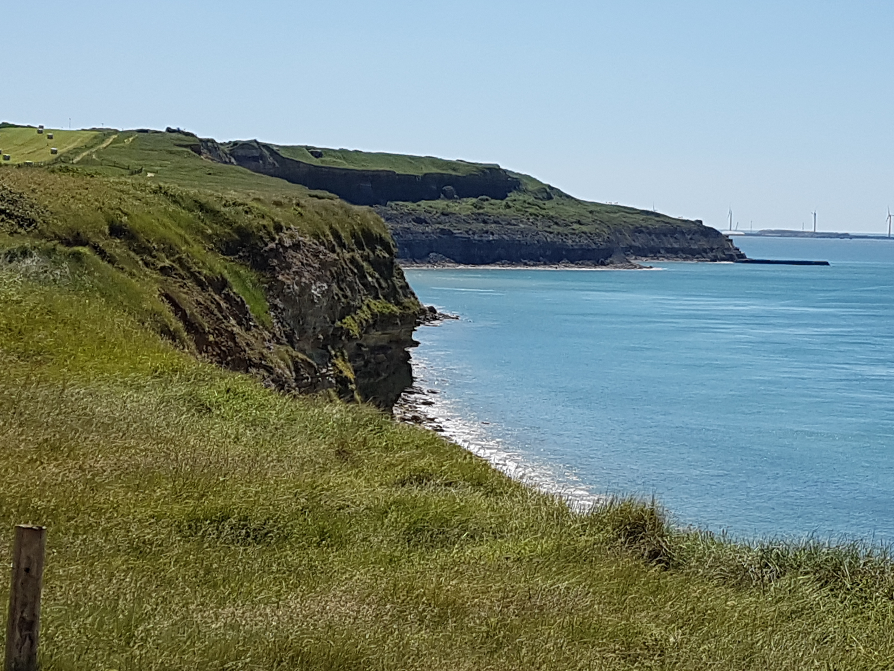 La pointe de la Crèche, entre Boulogne-sur-Mer et Wimereux (Pas-de-Calais, France)